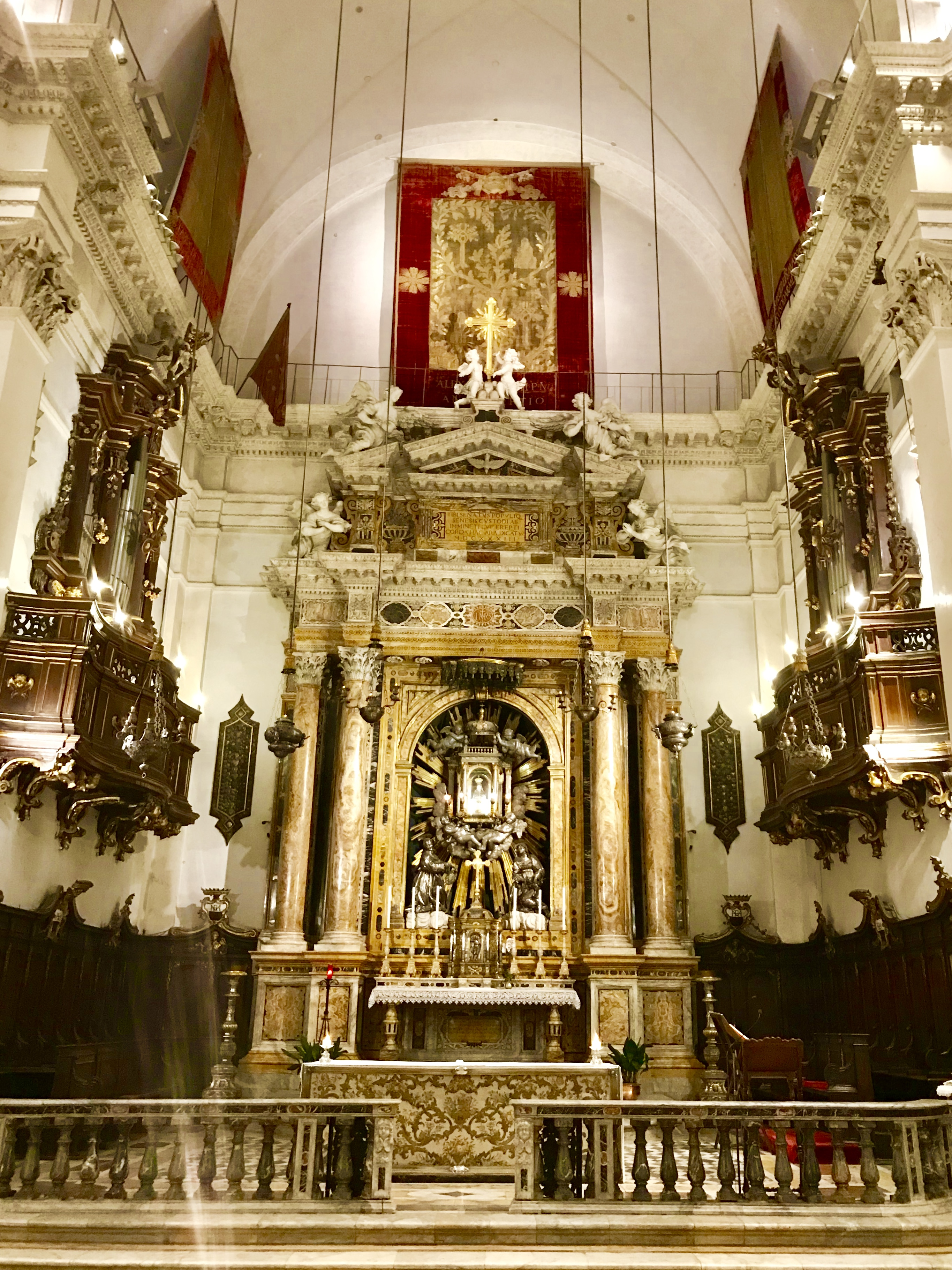 abside S. Maria in Provenzano